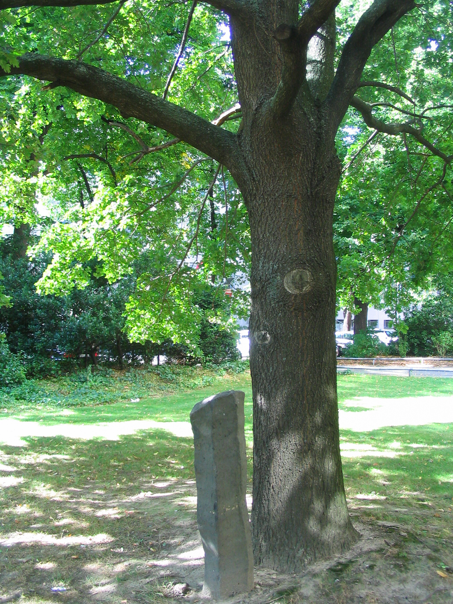 Aufschrift der Erklärungstafel: Joseph Beuys: „Eiche und Basaltsäule“. 1986 Säulenbasalt/Eiche. Die Installation entstand im Zusammenhang mit der Aktion „7000 Eichen“ auf der „Documenta 7“ in Kassel 1982. Standort Düsseldorf, Haroldstraße; Blickrichtung Nord.